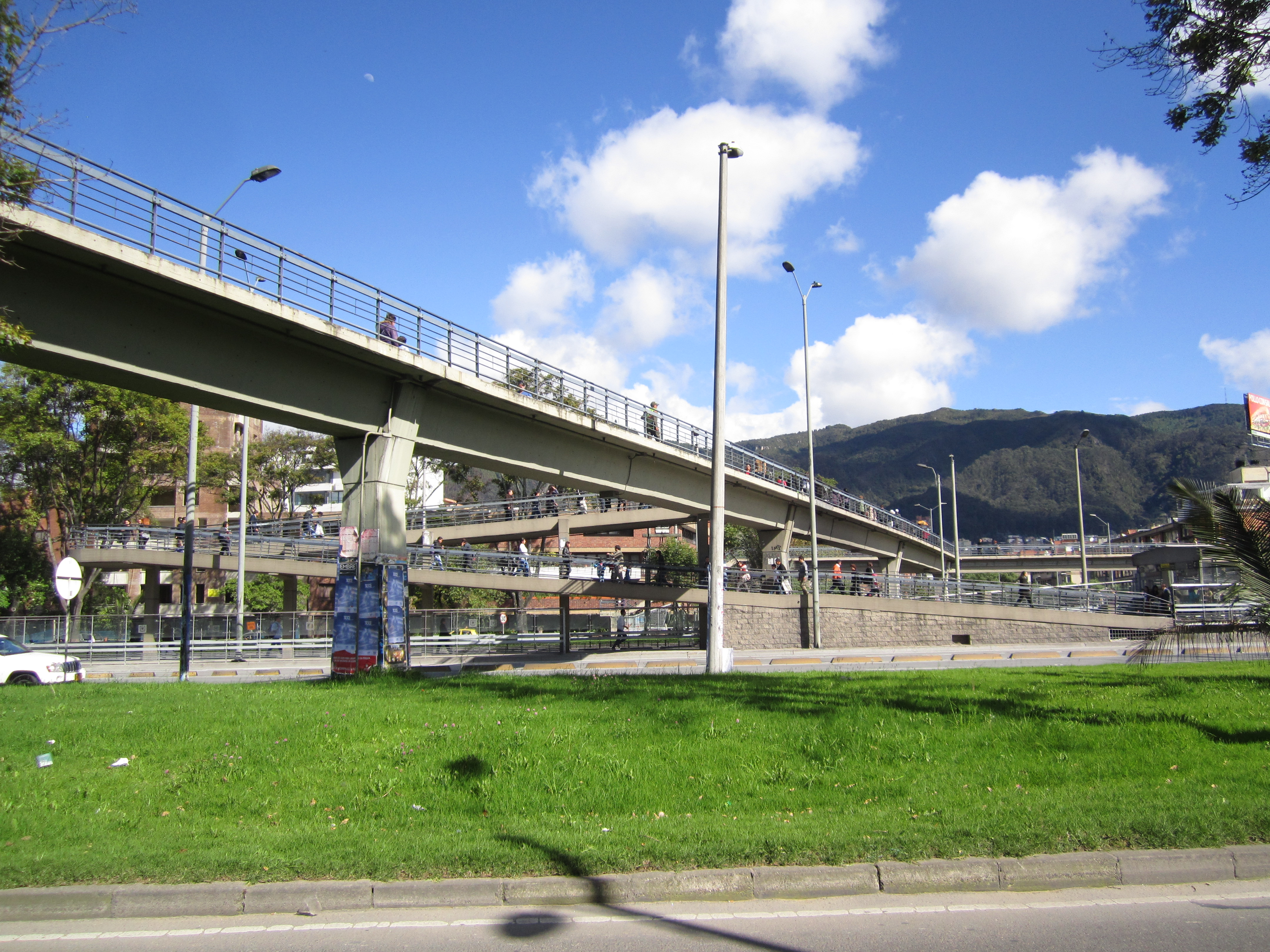 Bogota estación de TransMilenio en la Calle 85 con Autopista Norte.